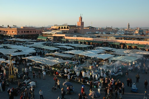 Marràqueix - Djemà-el-Fna